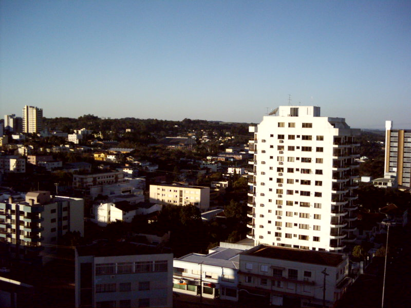 Panorama do centro da cidade de Erechim, Rio Grande do Sul